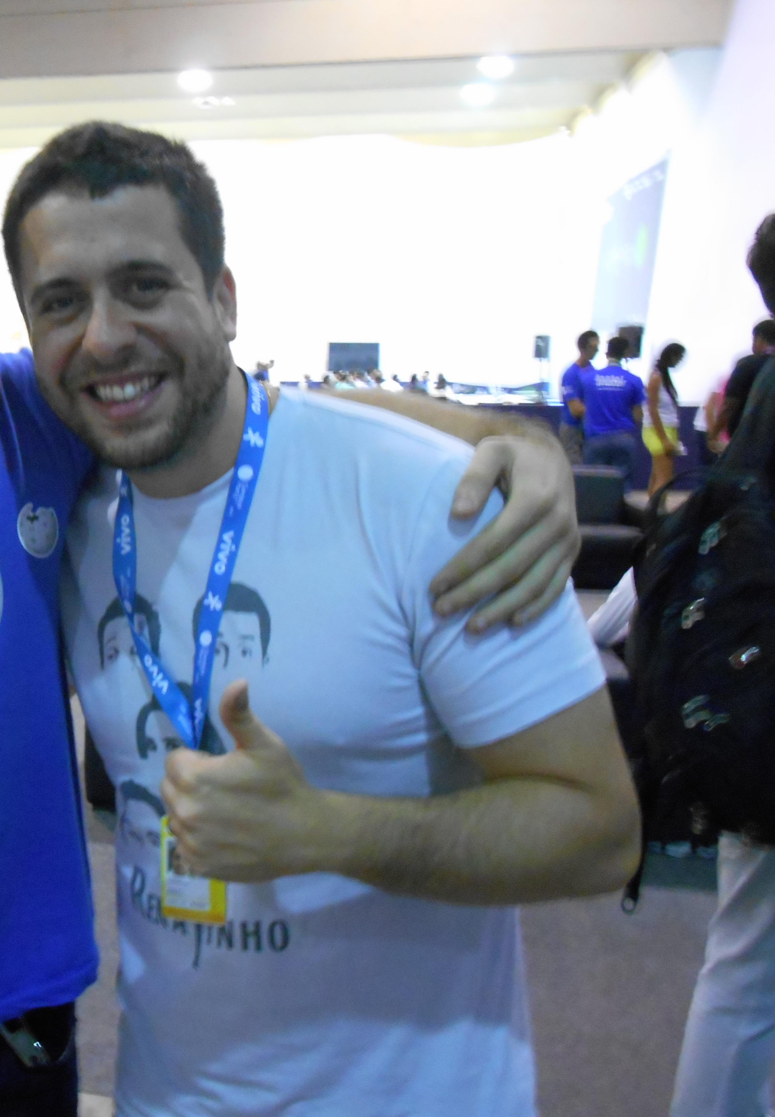 Maurício Meirelles na Campus Party em 2015